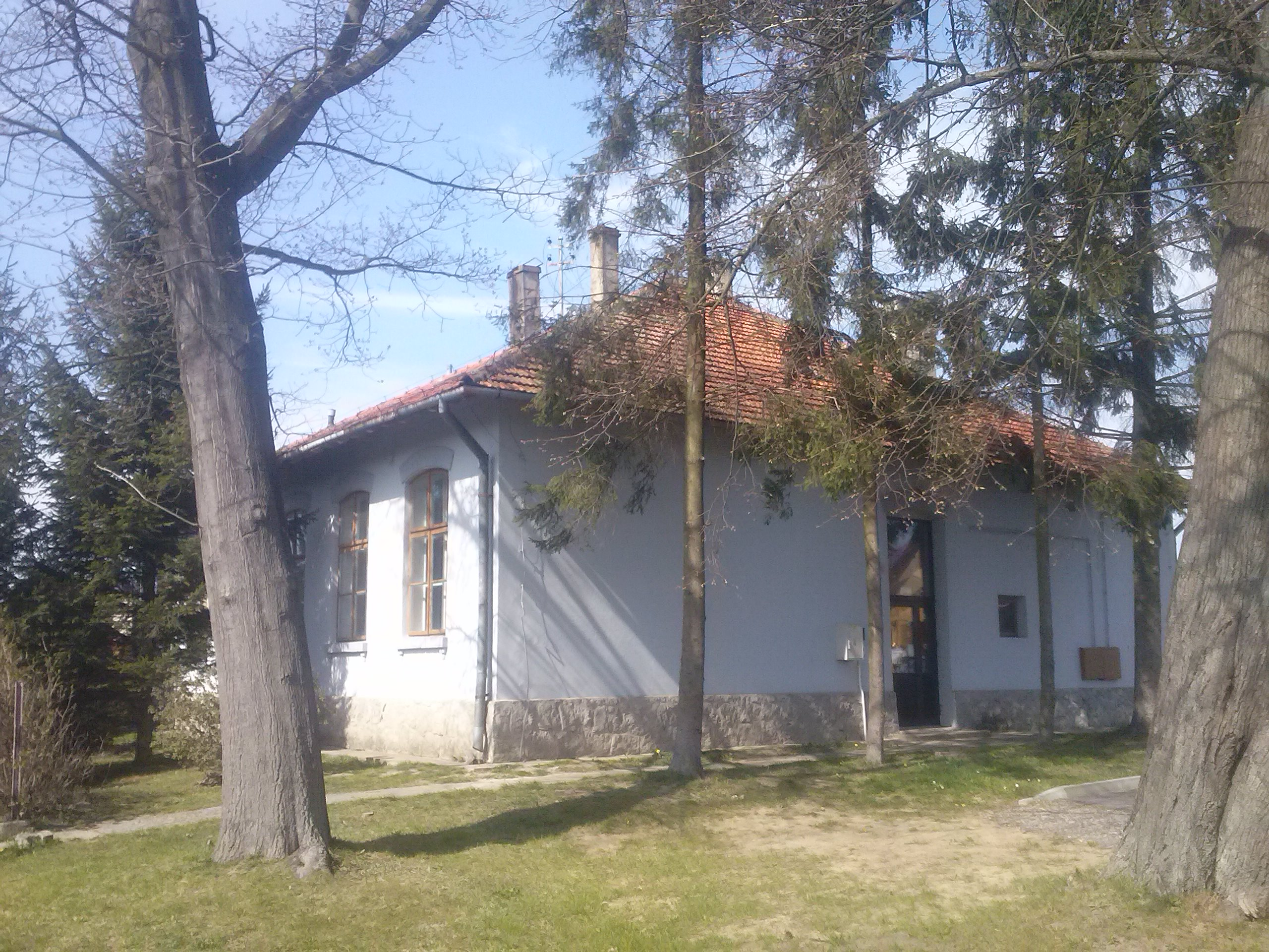 Budynek dawnej szkoły w Jagielle.